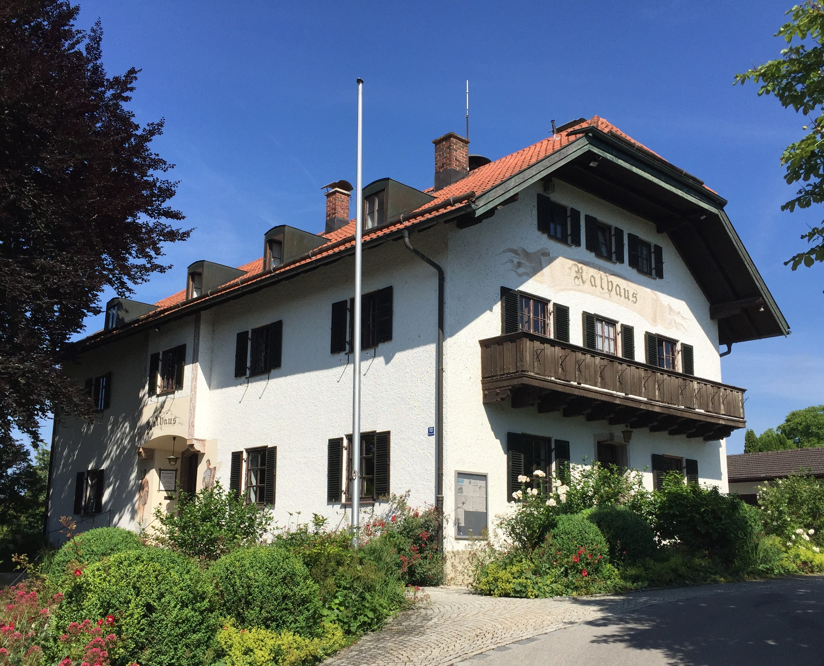 Rathaus Seeon